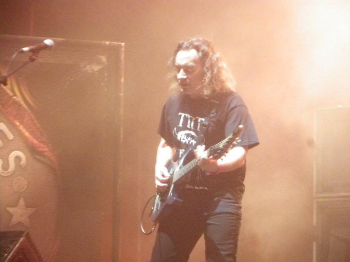 Alberto Cereijo en un concierto en la playa de Riazor del 2011